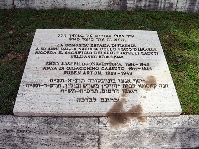 Lapide in memoria degli ebrei di Firenze caduti nel conflitto arabo-israeliano del 1948, posta nel 1998 a cura della comunità ebraica di Firenze.